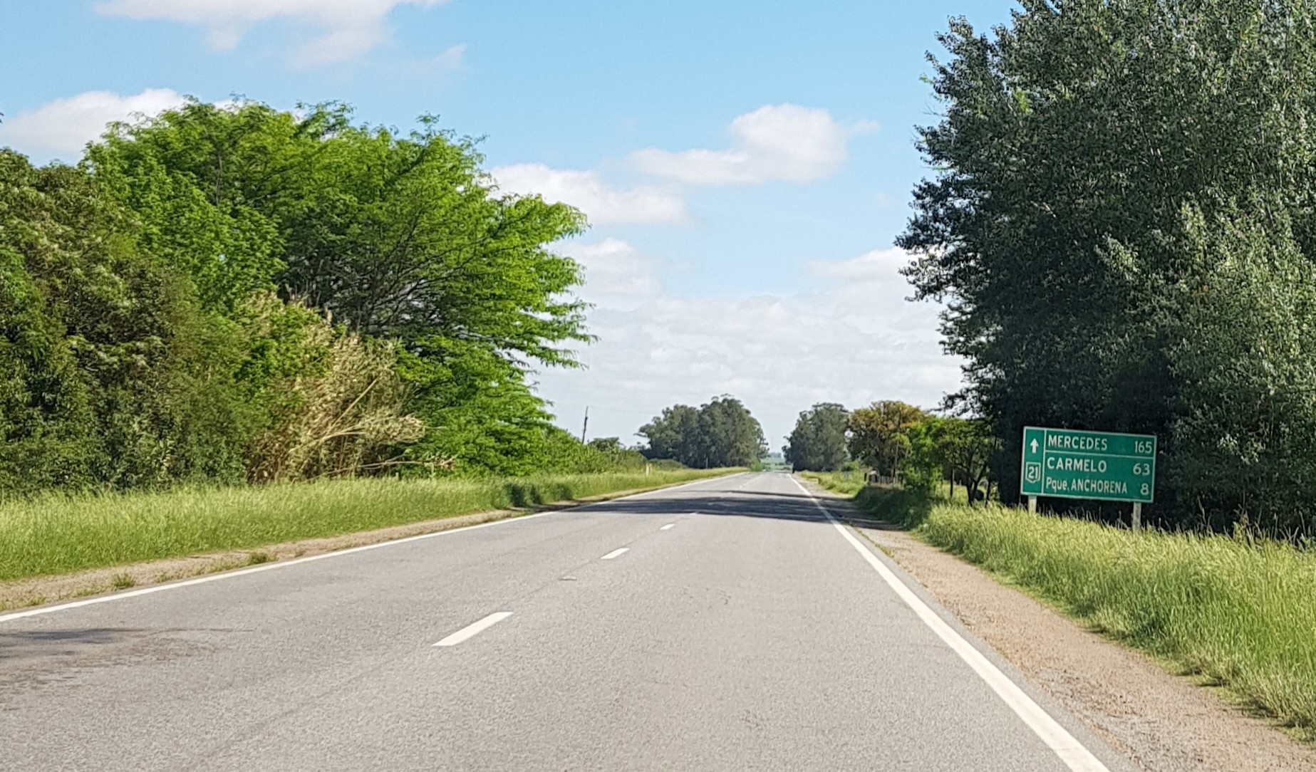 Ruta 21 al noroeste de Colonia del Sacramento, Uruguay. Próximo a su empalme con ruta 83.